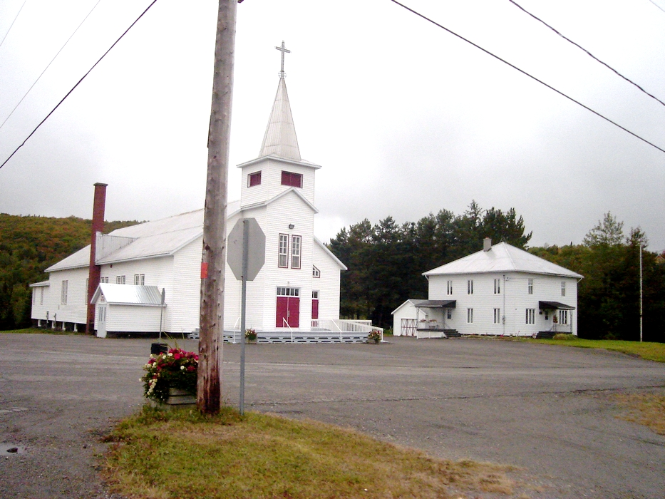 L'église de Saint-Pierre-de-Lamy